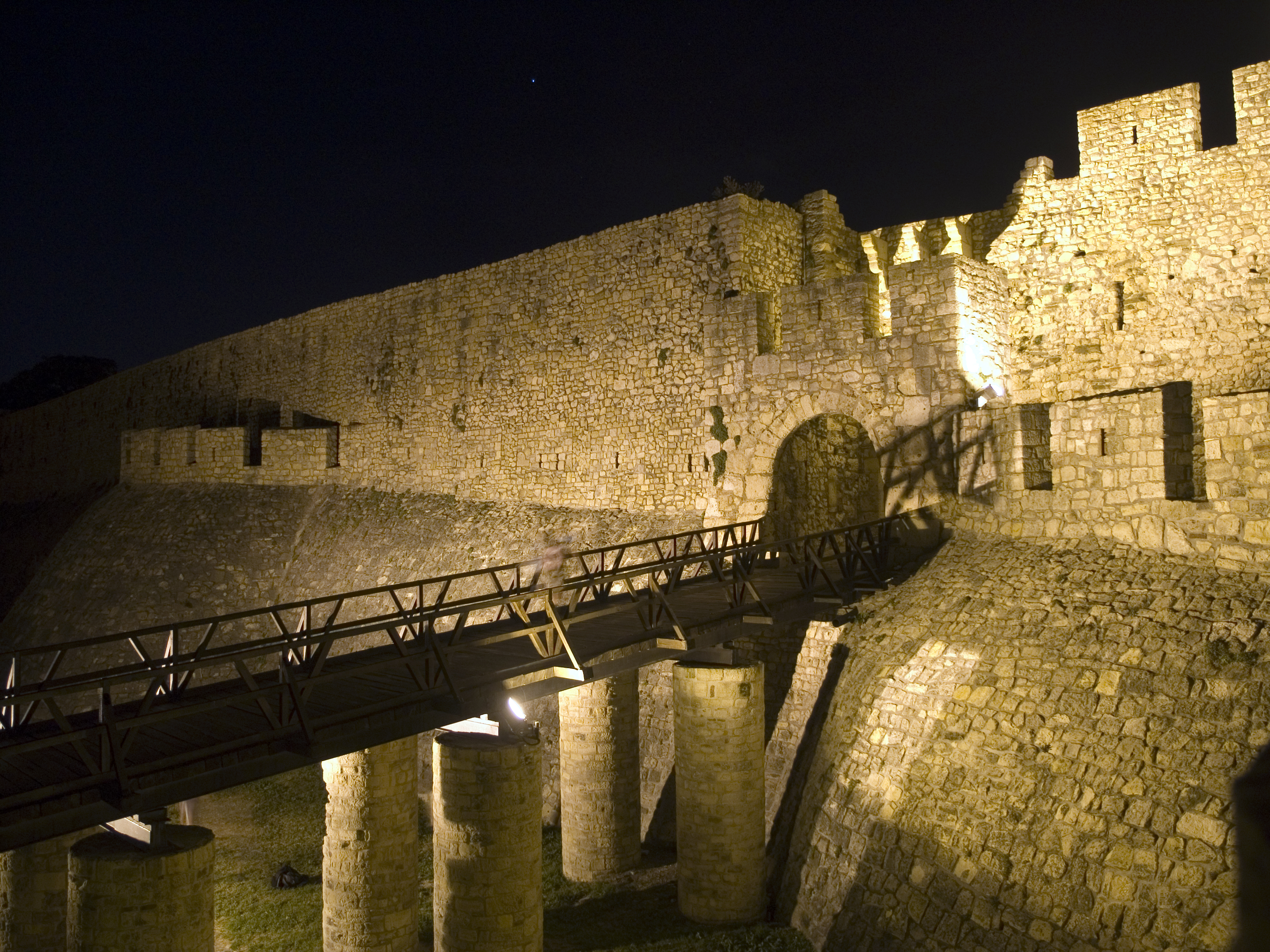 Сербия, Белград. Крепость Калемегдан ночью